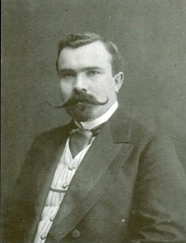 Ичас, Мартин Мартинович